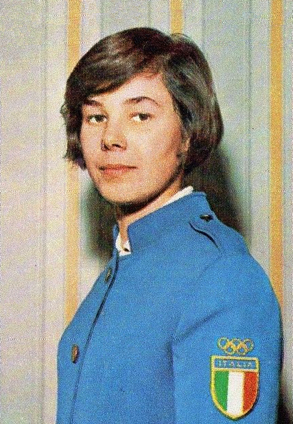 Figurina CAMPIONI dello SPORT 1969/70-n.387- FASOLIS - ITALIA -SCI-Rec